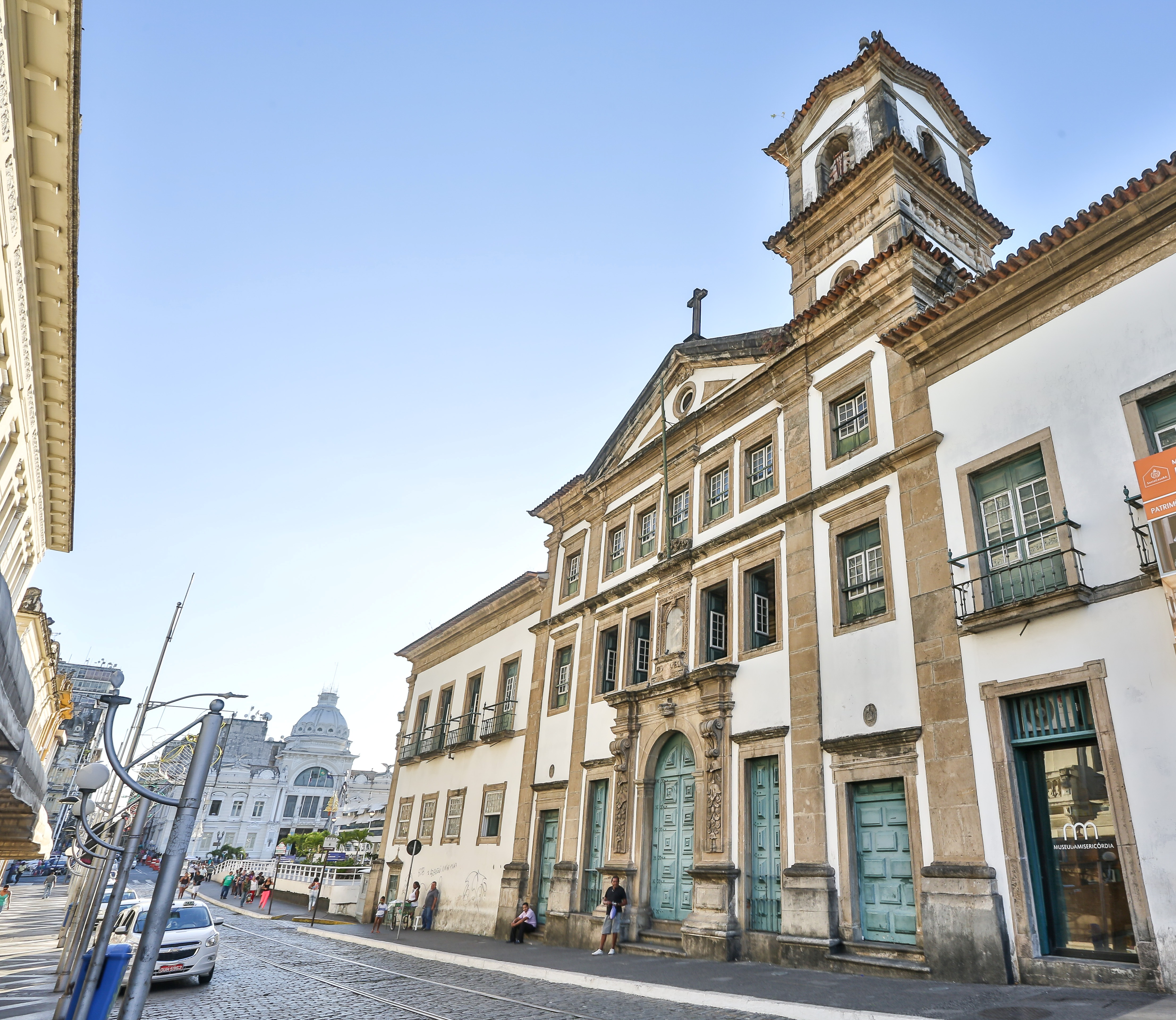 O Museu da Misericórdia é um dos mais importantes espaços culturais da Bahia e possui em seu acervo obras que contam um pouco da história do estado e do país. Também tem em seu espaço a Igreja da Misericórdia, considerada um marco da arte portuguesa e um dos mais belos monumentos religiosos de Salvador.